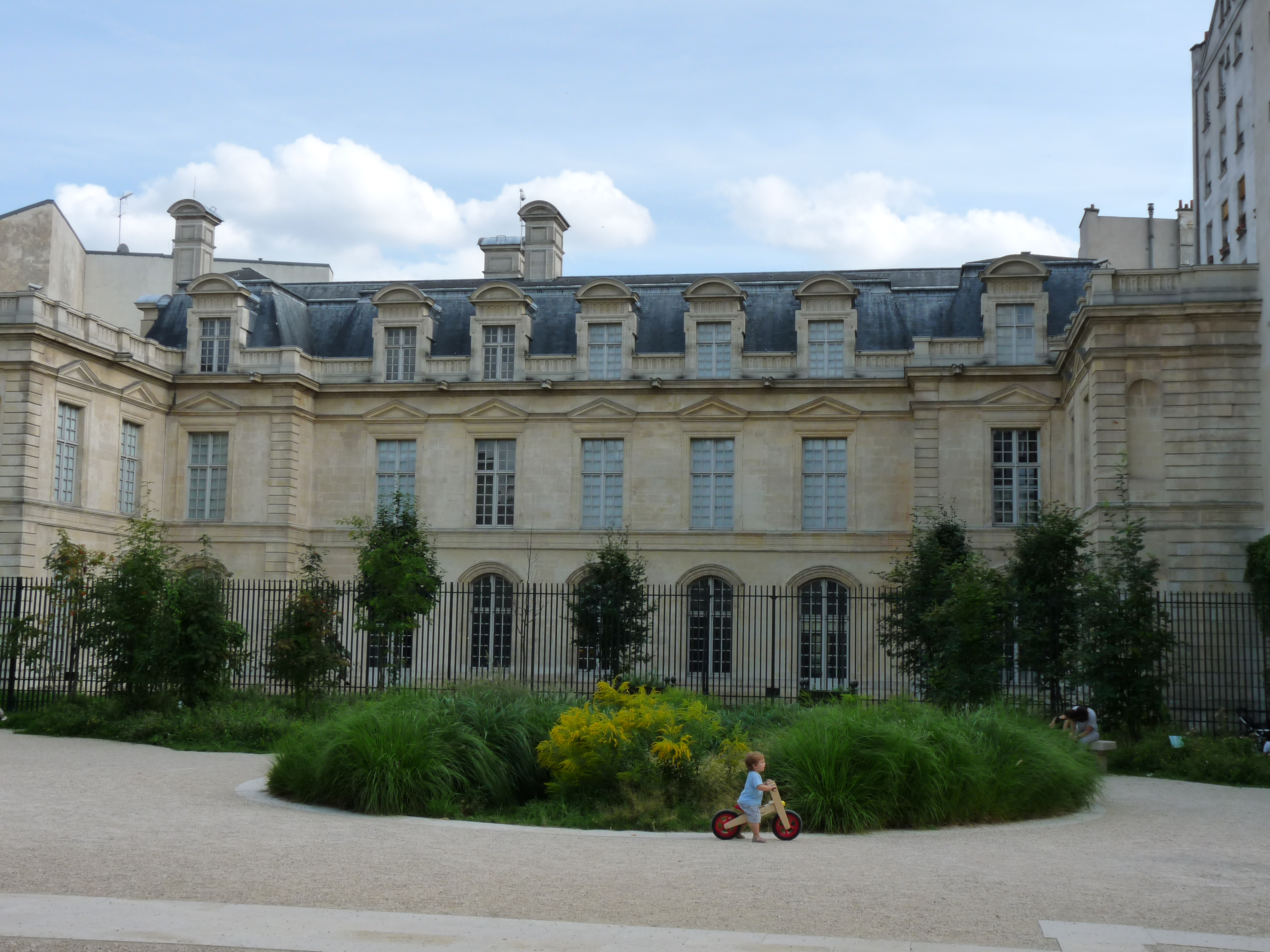 Le jardin Anne Frank à Paris, avec vue sur l'arrière de l'hotel Saint-Aignan.